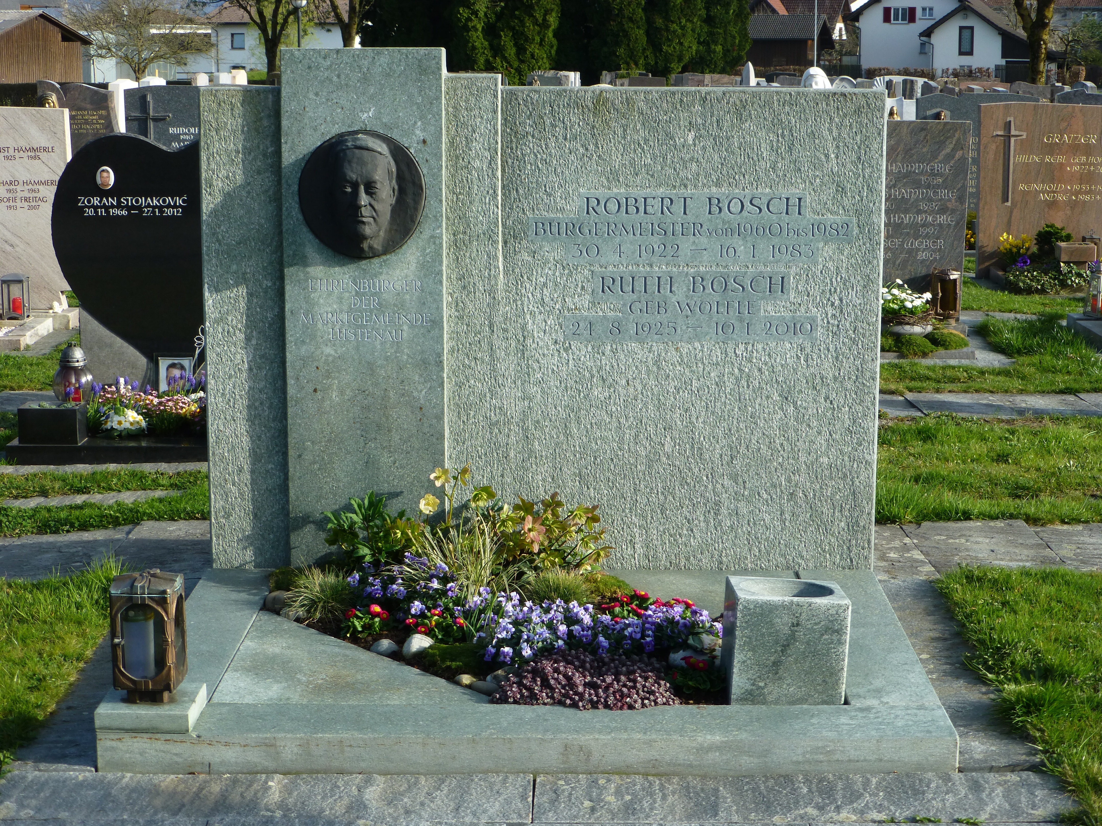 Ehrengrab des Lustenauer Bürgermeisters und Ehrenbürgers Robert Bösch im Gemeindefriedhof im Hasenfeld